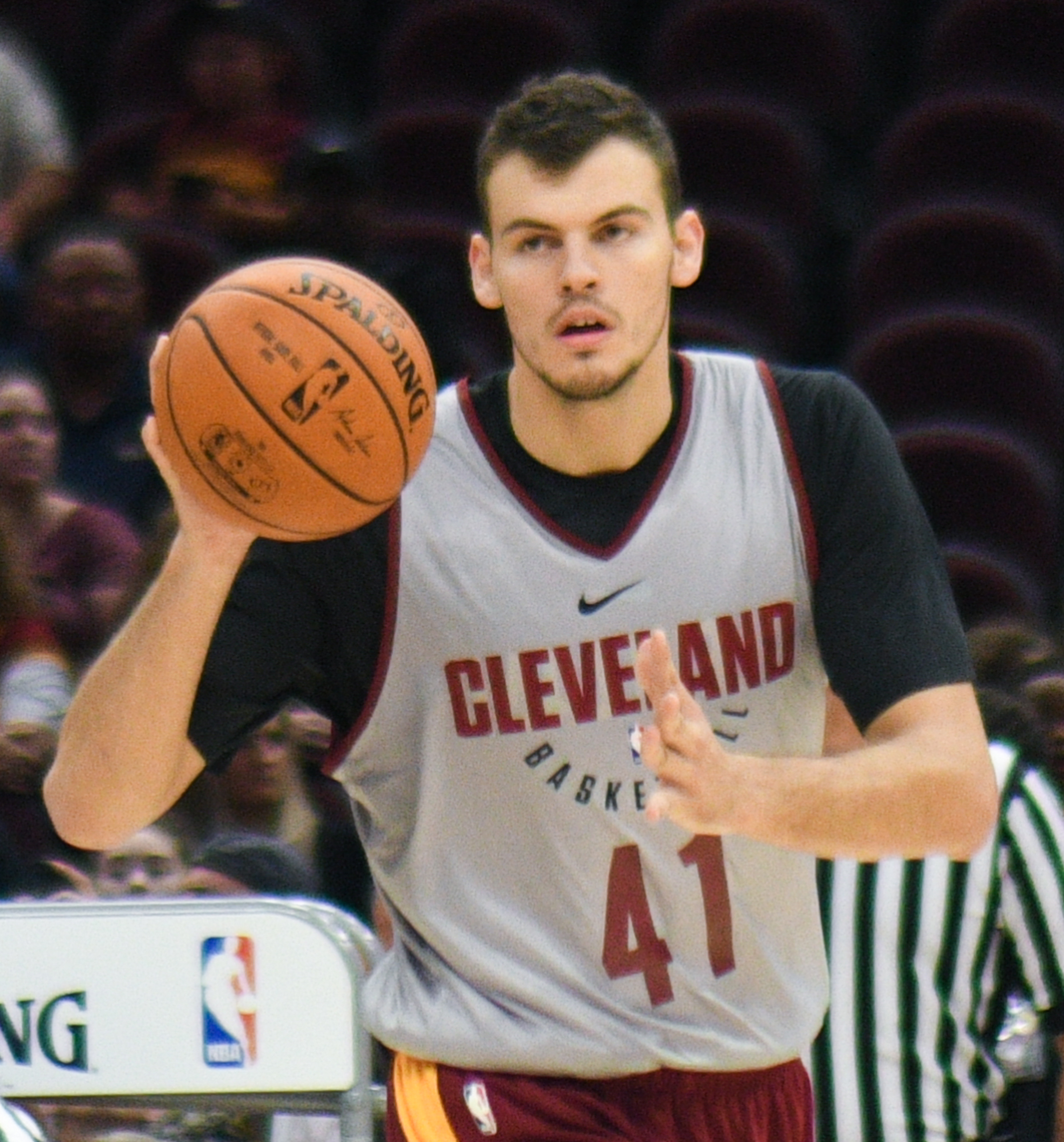 Ante Zizic